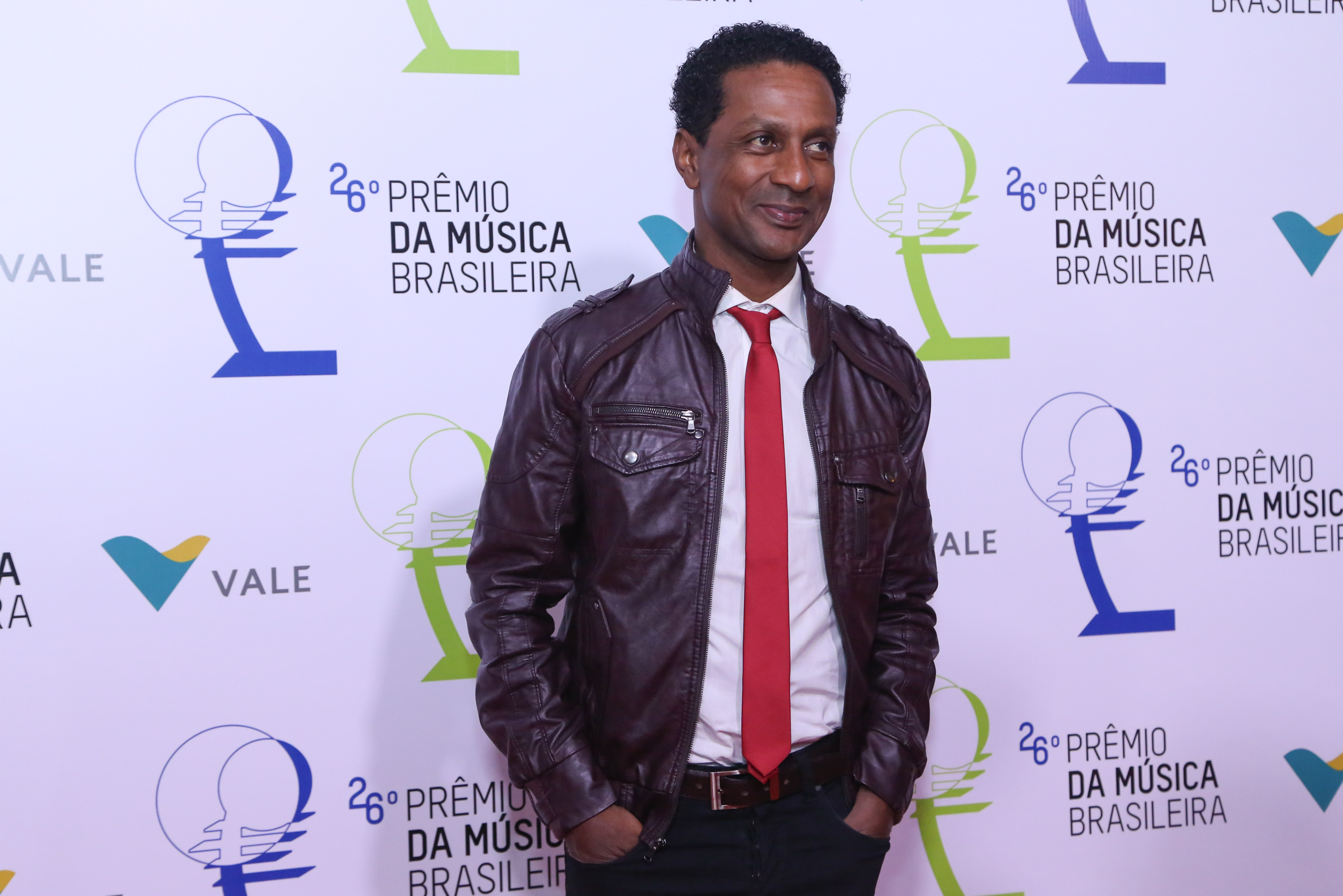 Luiz Miranda - 26° Prêmio da Música Brasileira 2015, no Theatro Municipal, no Centro do Rio de Janeiro/RJ. (10/06/15) Foto: Roberto Filho/Divulgacão